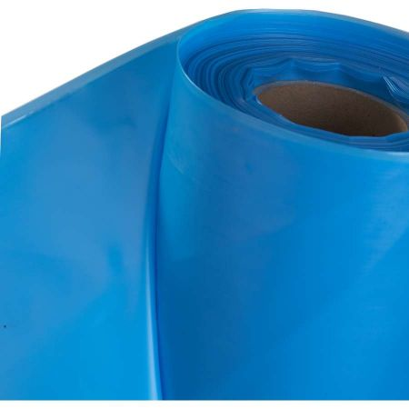 Dampfbremsfolie zur Abdichtung innerer Dachausbau nach EnEV